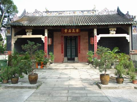 廖萬石堂